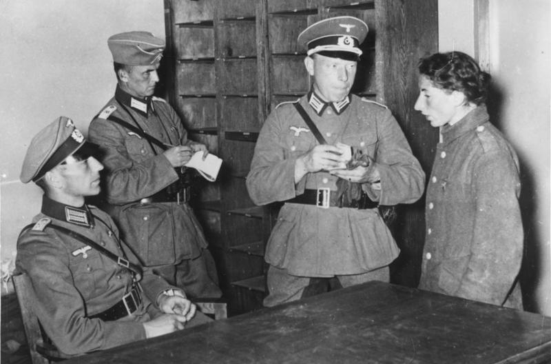 This description has been identified as biased or incorrect: NS-PropagandaJüdisches Flintenweib als Anführerin gemeiner Mordbanditen. Von den deutschen Truppen wurde in der Nähe von Brest-Litowsk diese Warschauer Gettojüdin namens Bajla Gelblung aufgegriffen. Sie versuchte, in der Uniform eines polnischen Soldaten zu flüchten und wurde als Anführerin einer der grausamsten Mordbanden wiedererkannt. Trotz ihrer echt jüdischen Frechheit gelang es ihr nicht, die Taten abzuleugnen. 21.9.1939 [Herausgabedatum] Es ist zu nennen: PK-Boesig-Weltbild Fr OKW [Vgl. Bild 101I-121-0010-24]